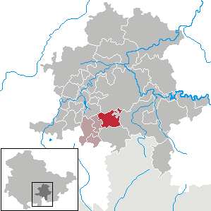 Reichmannsdorf in Thuringia - District Saalfeld-Rudolstadt